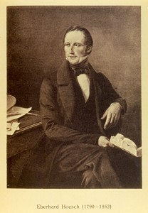 Portraitaufnahme